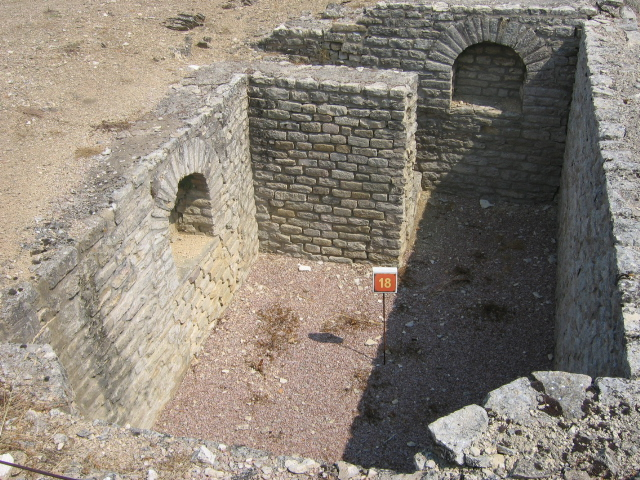 Alise-Sainte-Reine, Bourgogne, France : fouilles